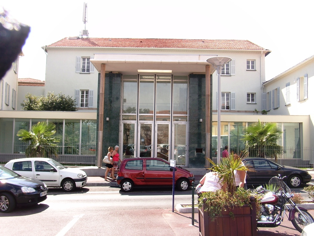 Tribunal d'instance de Fréjus (83)